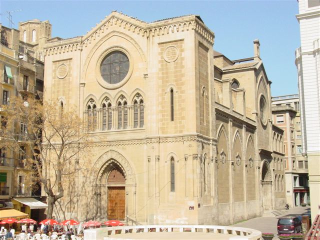 Iglesia de Sant Joan de Lleida